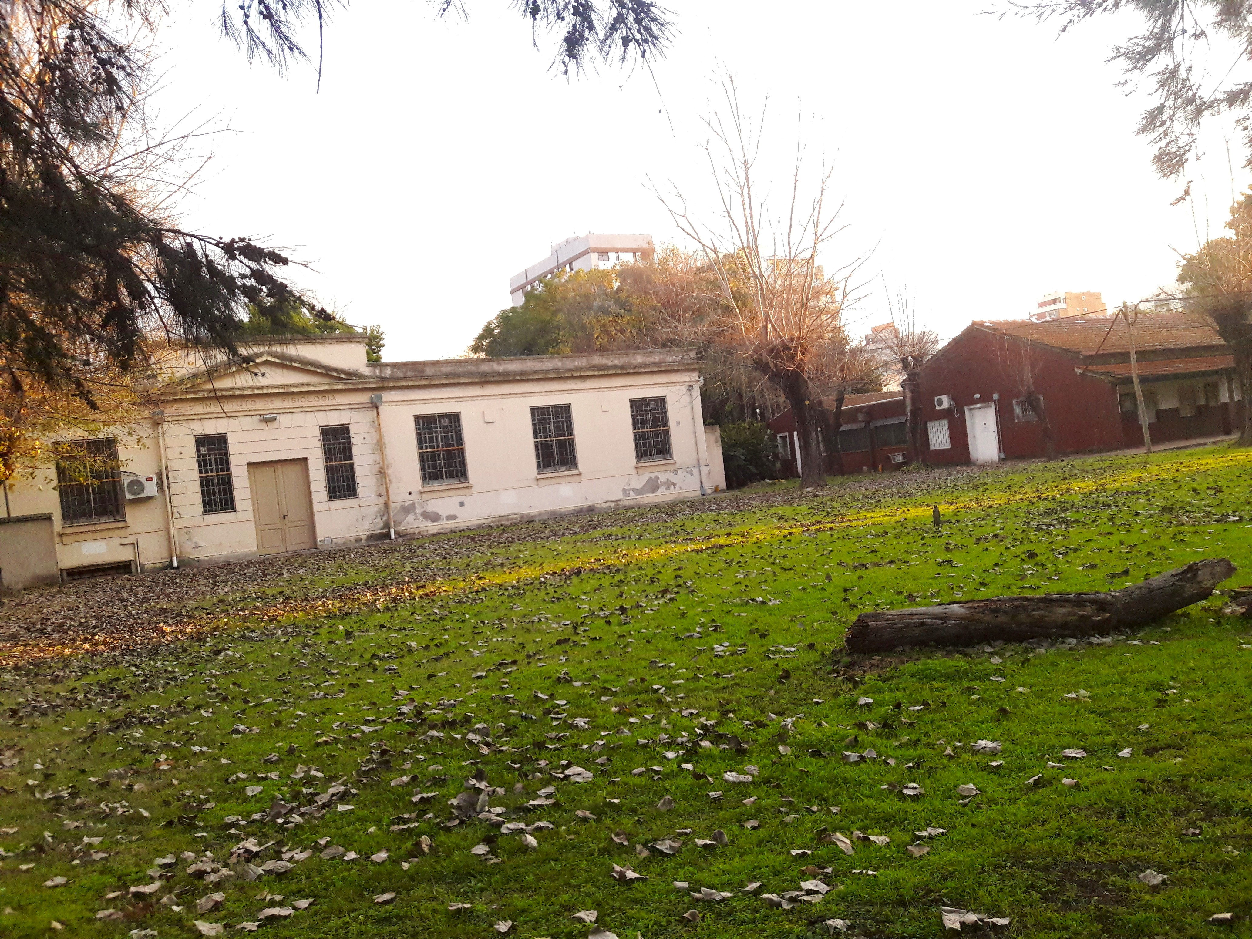 En una tarde otoñal